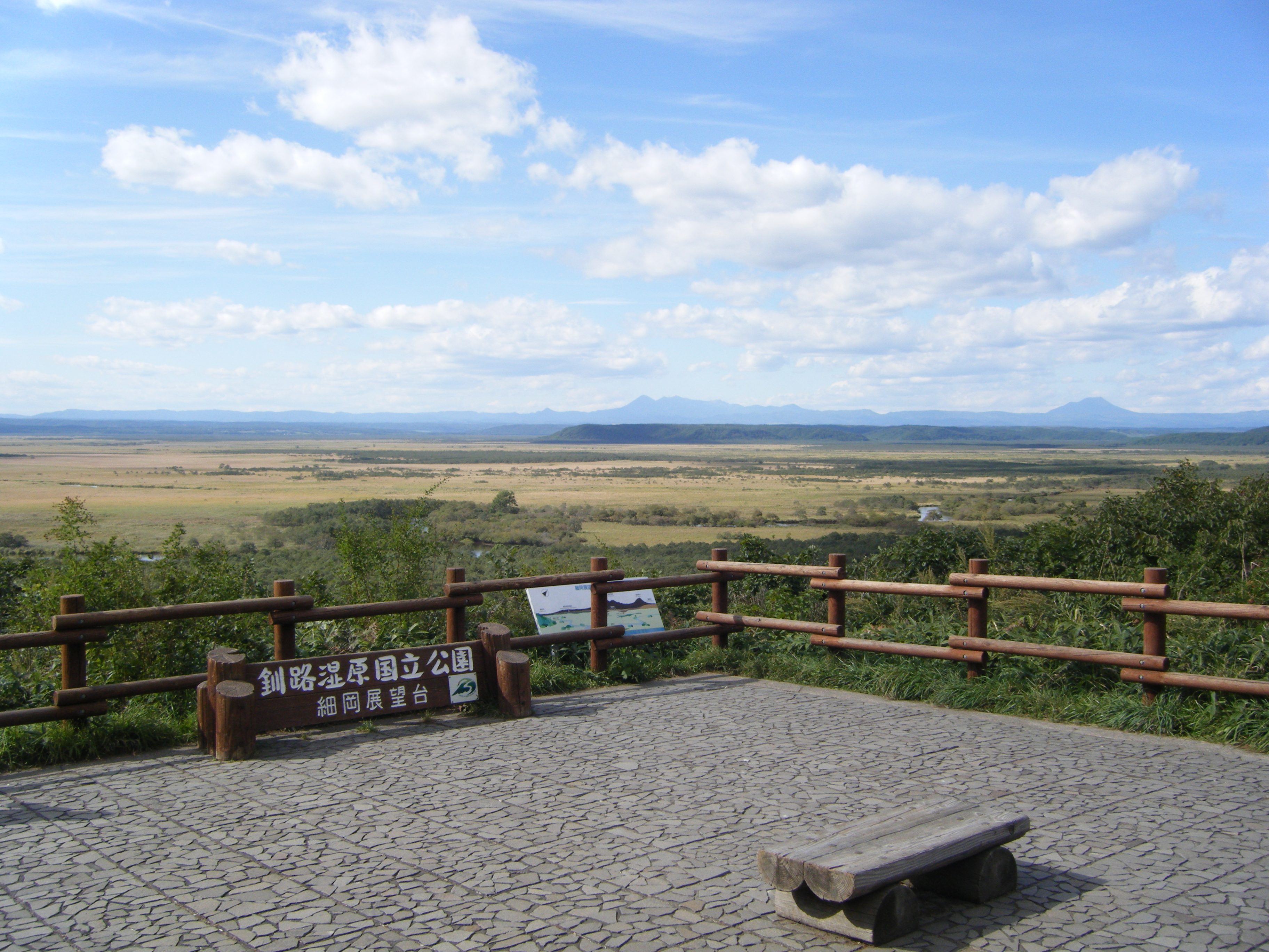 釧路湿原（細岡展望台より撮影）